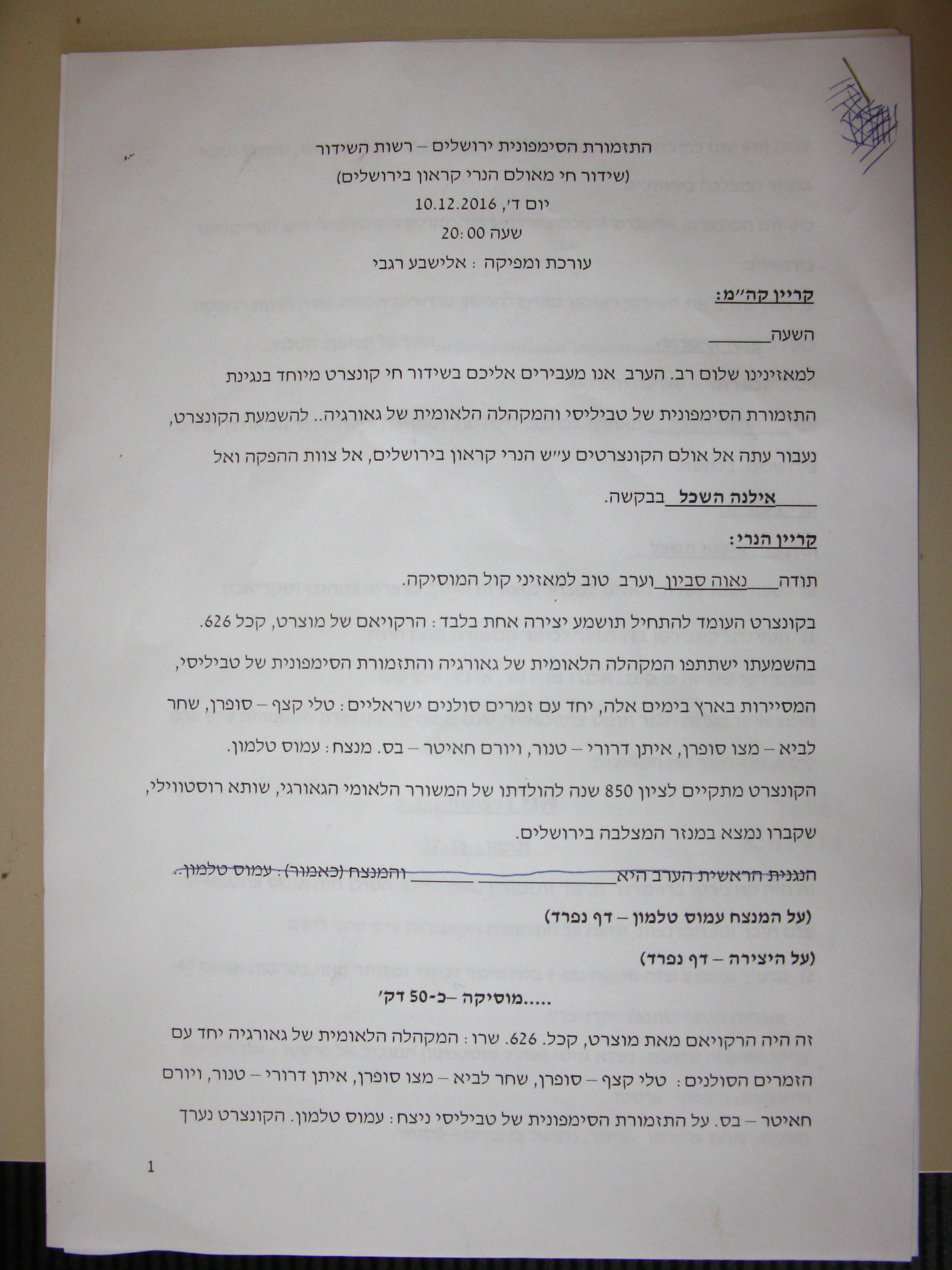 בניין קול ישראל ברחוב הלני המלכה בירושלים, משמש את תחנת הרדיו "קול ישראל" מאז ימי הרדיו המנדטורי ב-1939, ולסגירת רשות השידור.